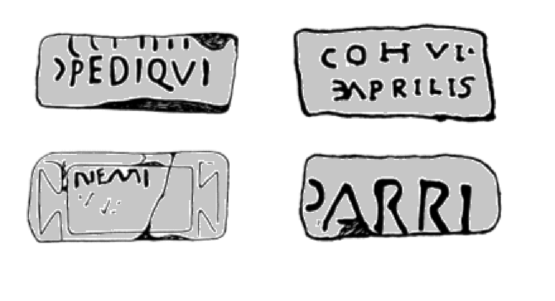 Centurialsteine aus Rudchester, gefunden im 19. Jahrhundert.